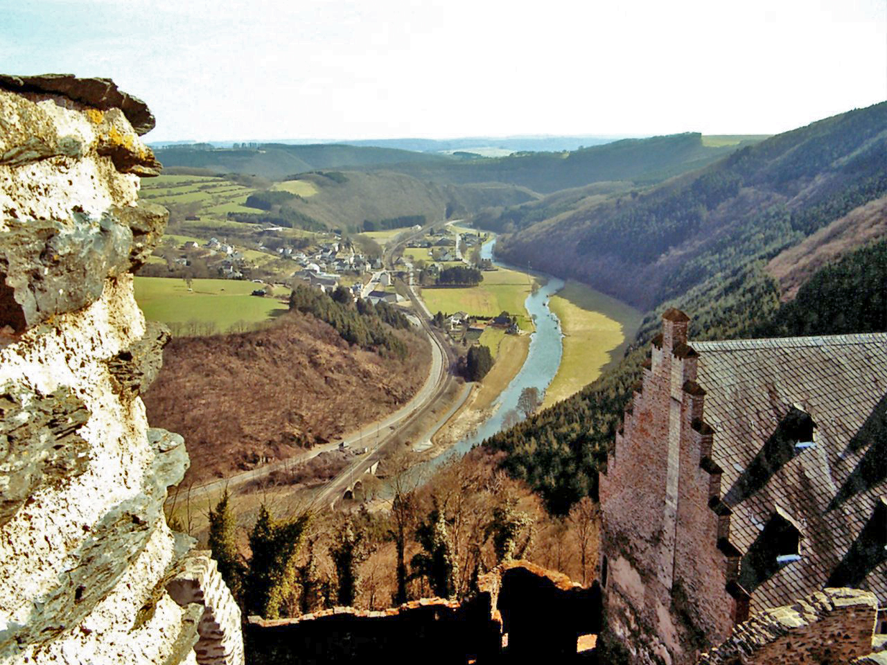 Sûre (Sauer) bei Michelau, gesehen von der Burg